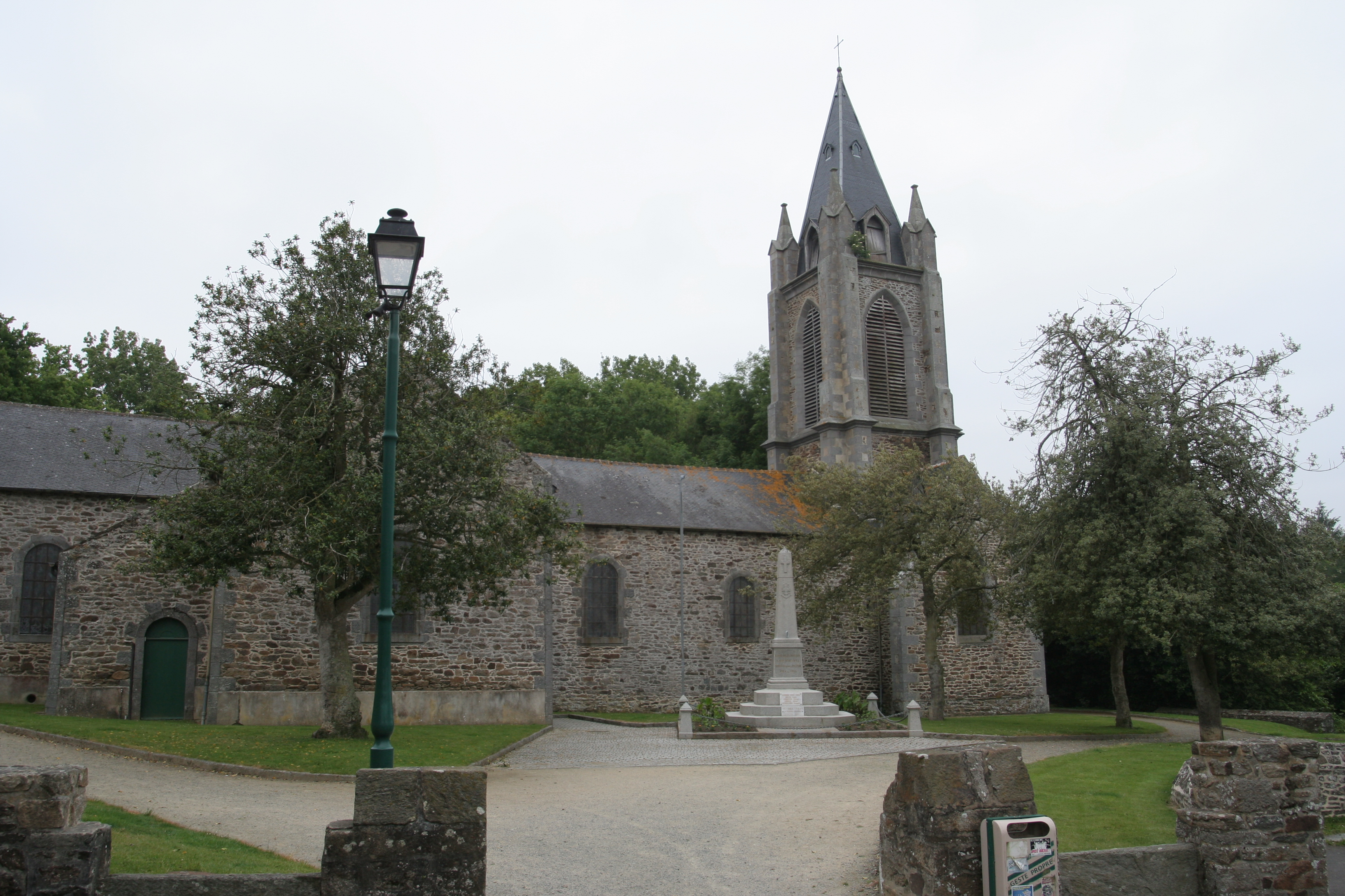 Église Notre-Dame-et-Sainte-Anne de La Ville-ès-Nonais.